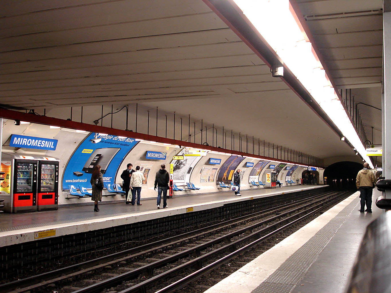 Station Miromesnil de la ligne 9 du métro de Paris, France.